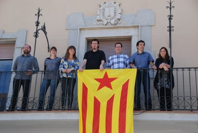 Instants després de la investidura, el nou equip de govern va sortir al balcó de l'Ajuntament